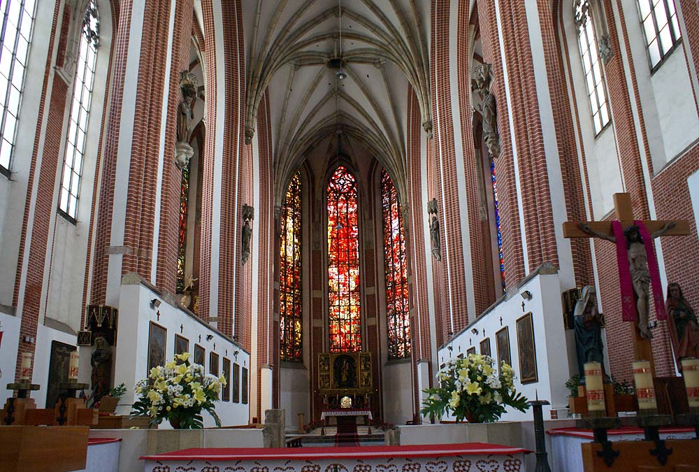 Kościół parafialny NM Panny „Na Piasku” , d. klasztorny św. Jadwigi, Miasto Wrocław - Śródmieście